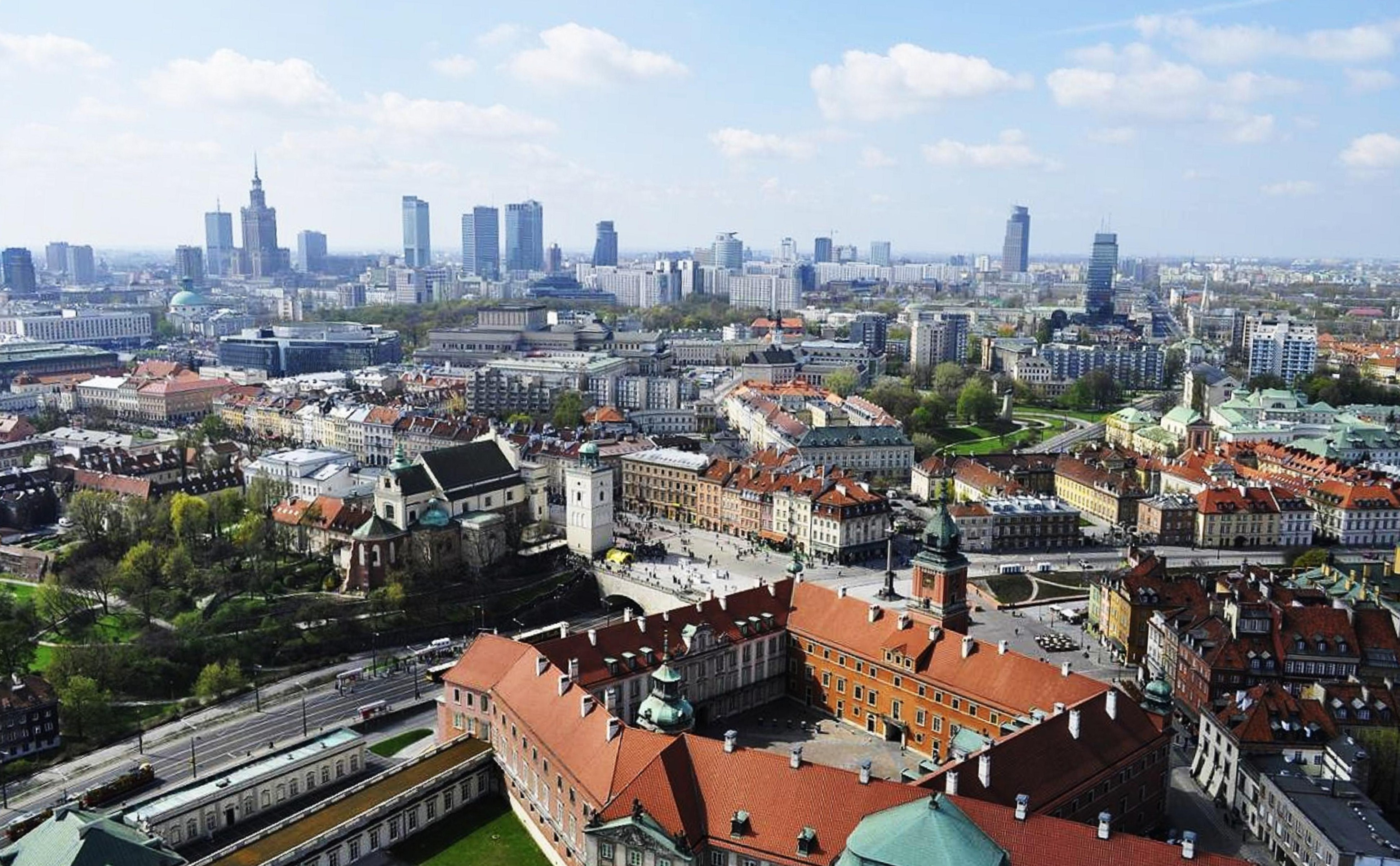 Lotnicza panorama Warszawy